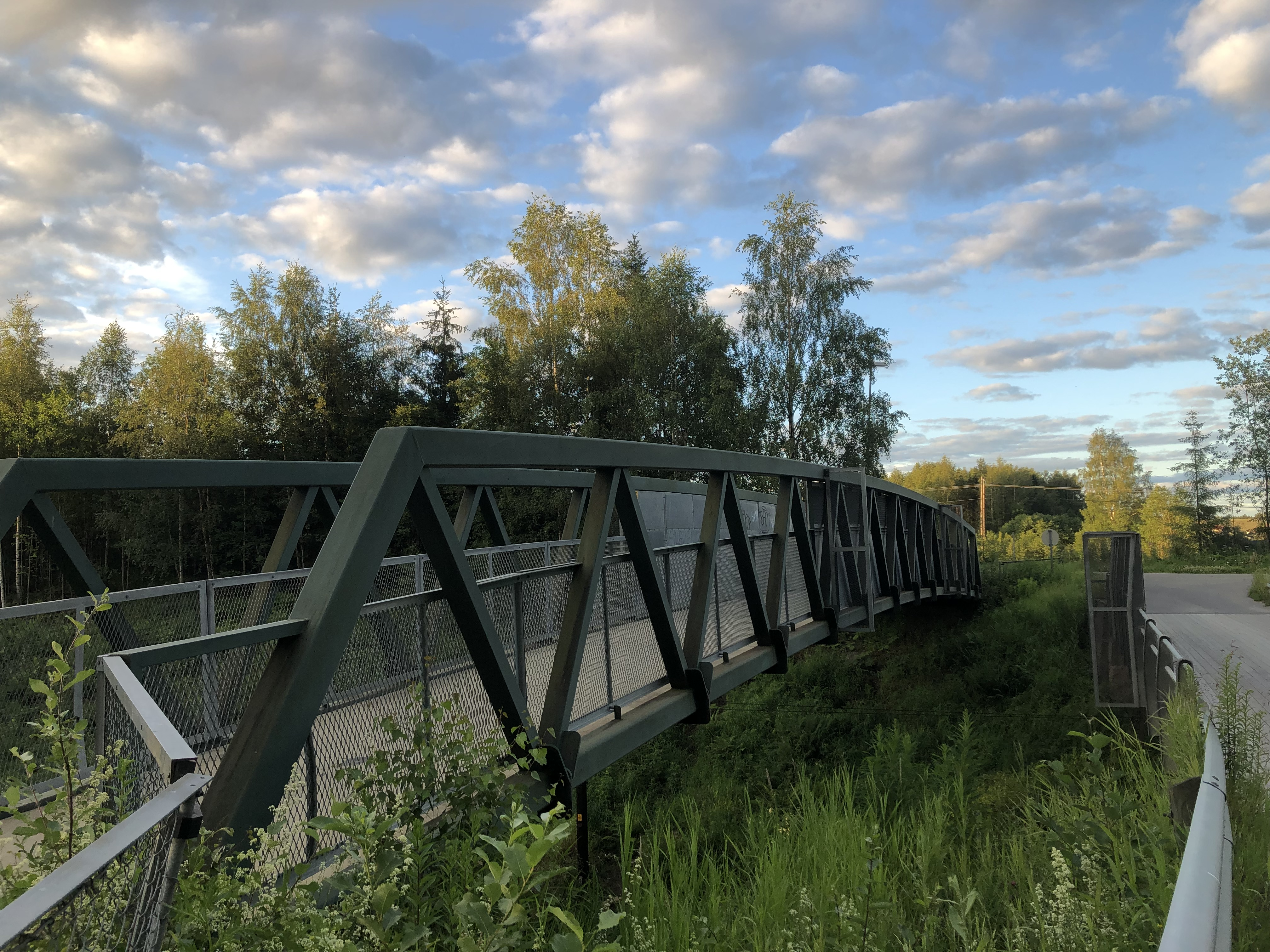 Skjæringsbrua over "Storskjæringa" i Ringveien i Hønefoss. Her er gangbroen.